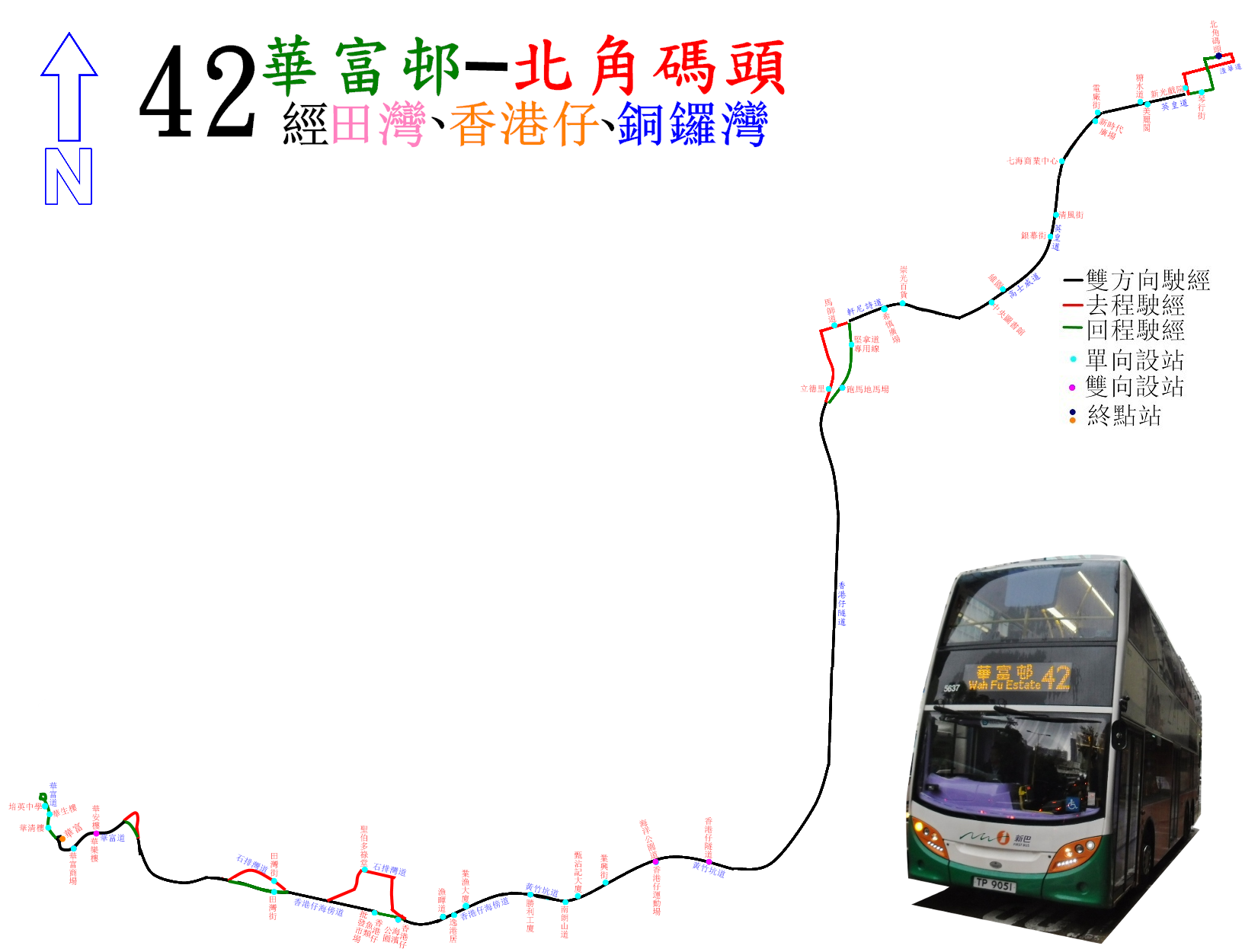 中文（香港）: 新巴42線的走線圖